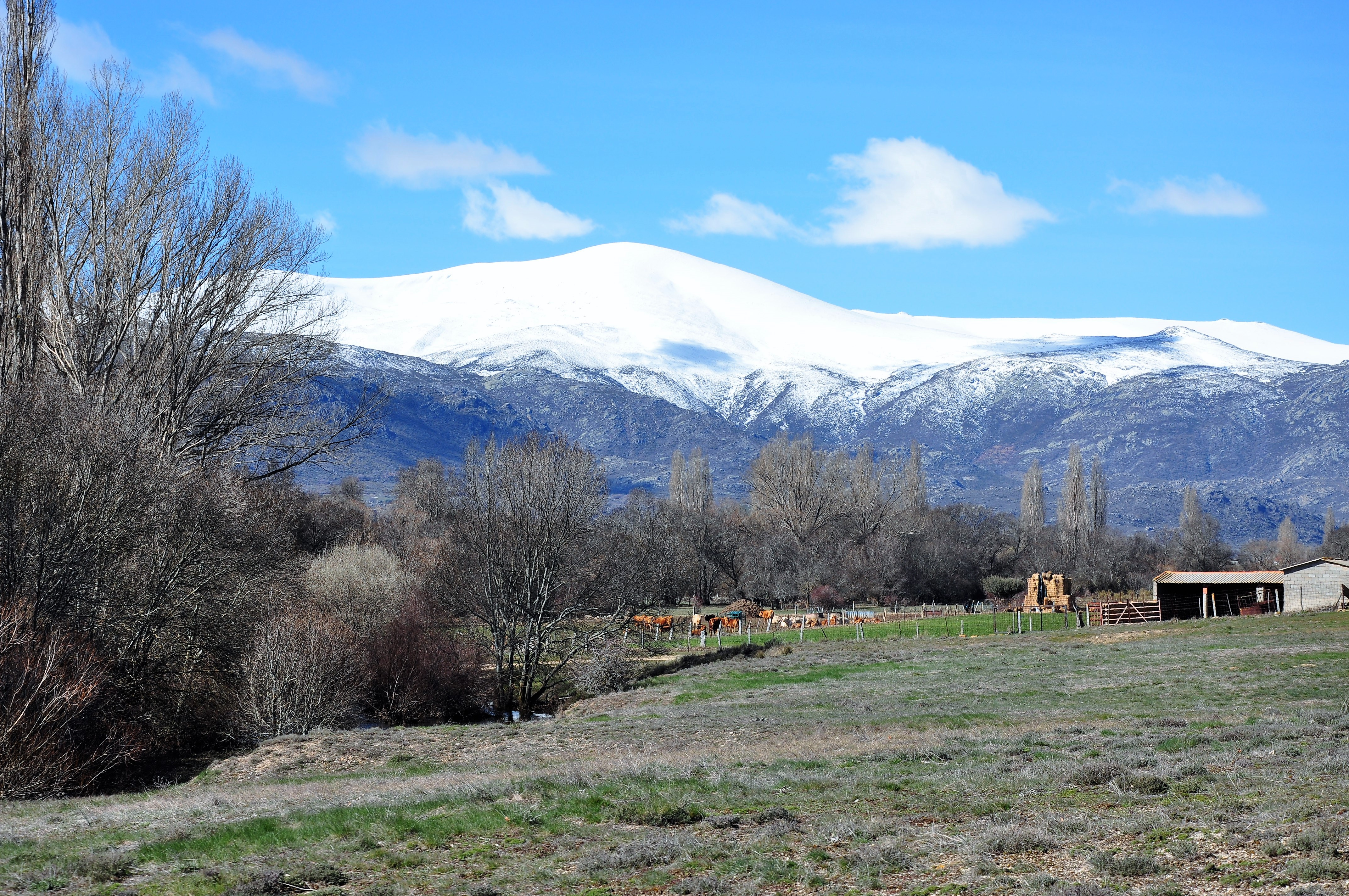 La Serrota desde el soto de La Torre, Ávila, España This is a photography of a Special Area of Conservation in Spain with the ID: ES4180081. Natura2000 entry, EEA entry